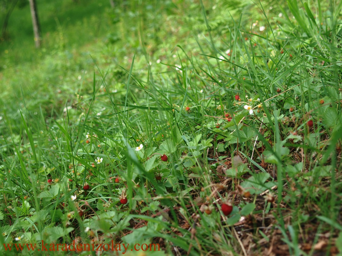 Hanifta, cennet meyvesi